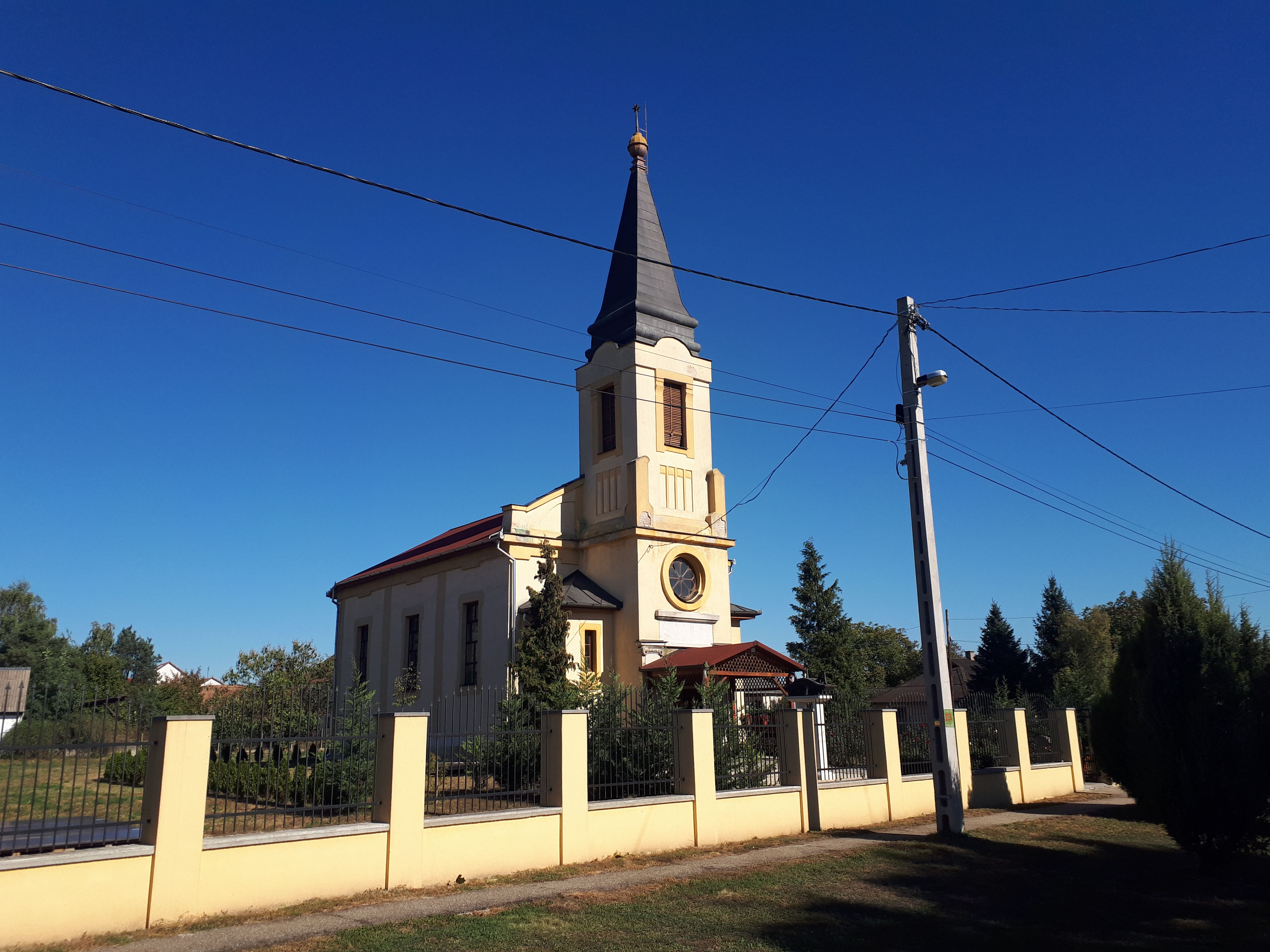 Az 1939-ben felépült református templom Hernádkak településen